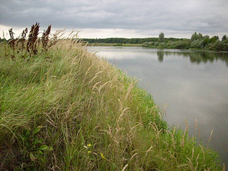 Bug w okolicach Starych Mierzwic.